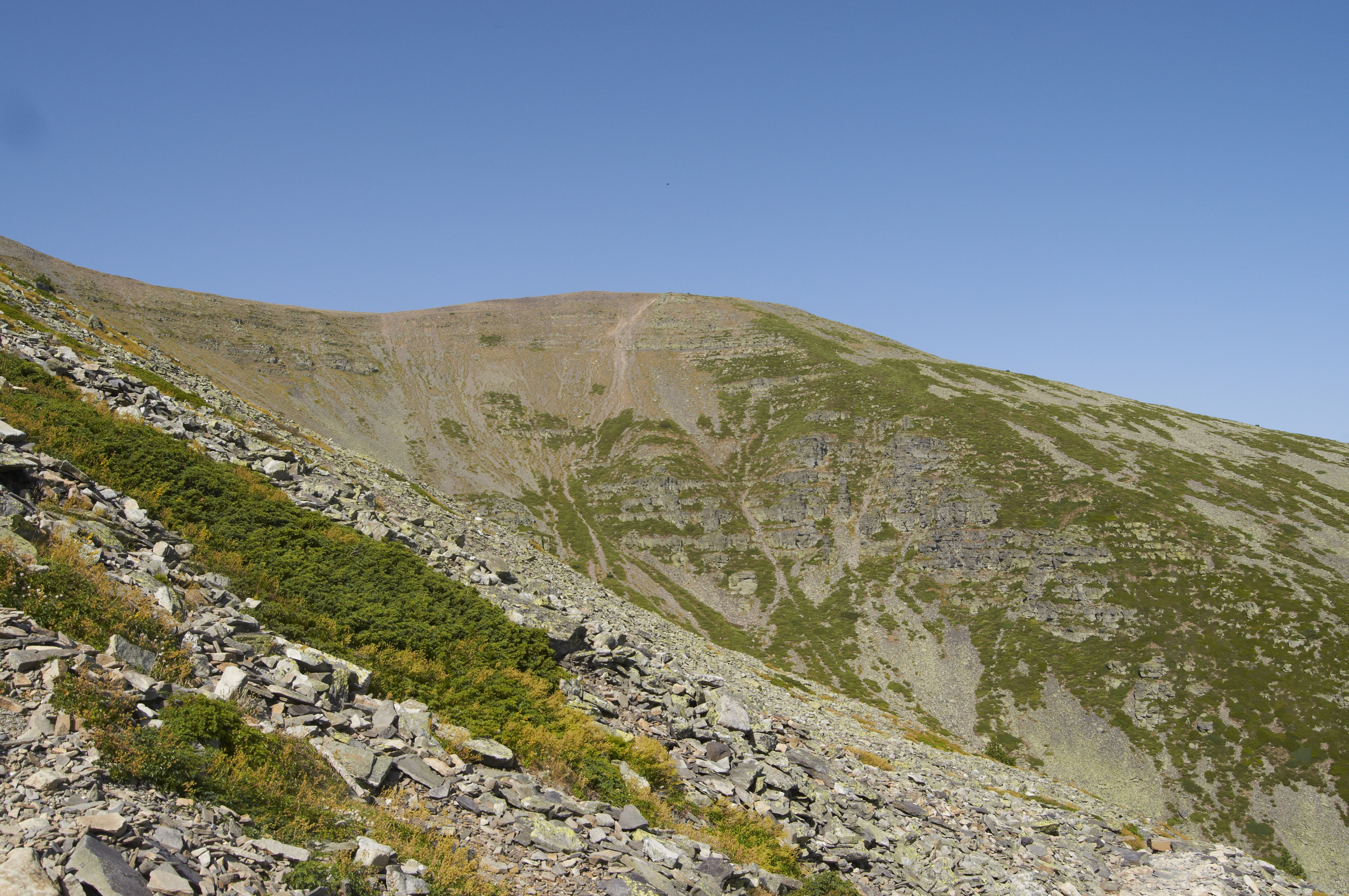 Moncayo